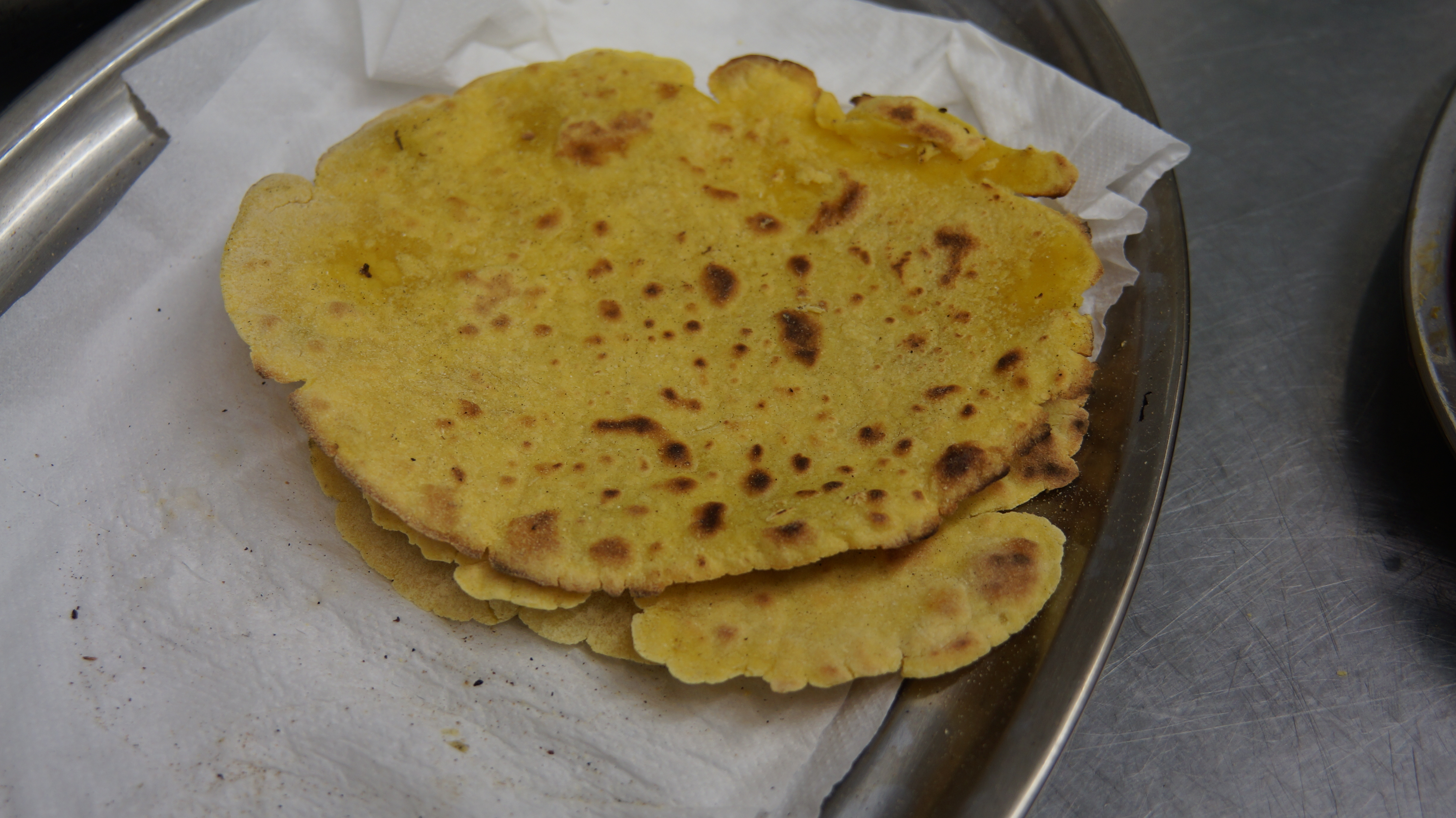 Bi taloren argazkia, inongo gehigarririk jarri aurretik